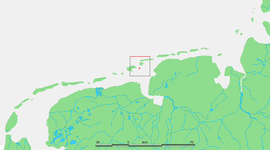 Wadden - Lütje Hörn